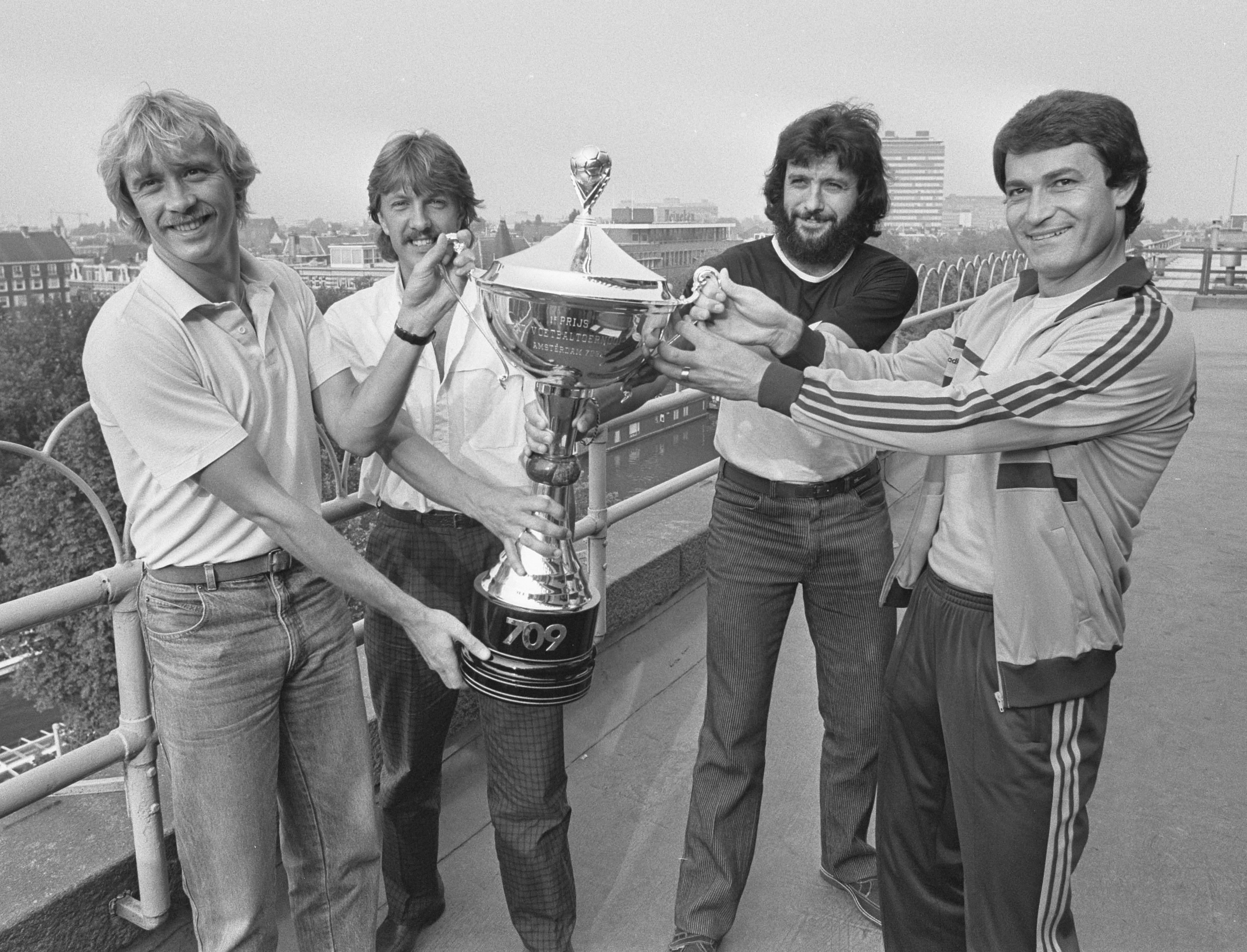 Persconferentie Amsterdam 709 toernooi; de aanvoerders Schoenaker (Ajax), Wijnstekers (Feyenoord), Olivera en Ștefănescu.